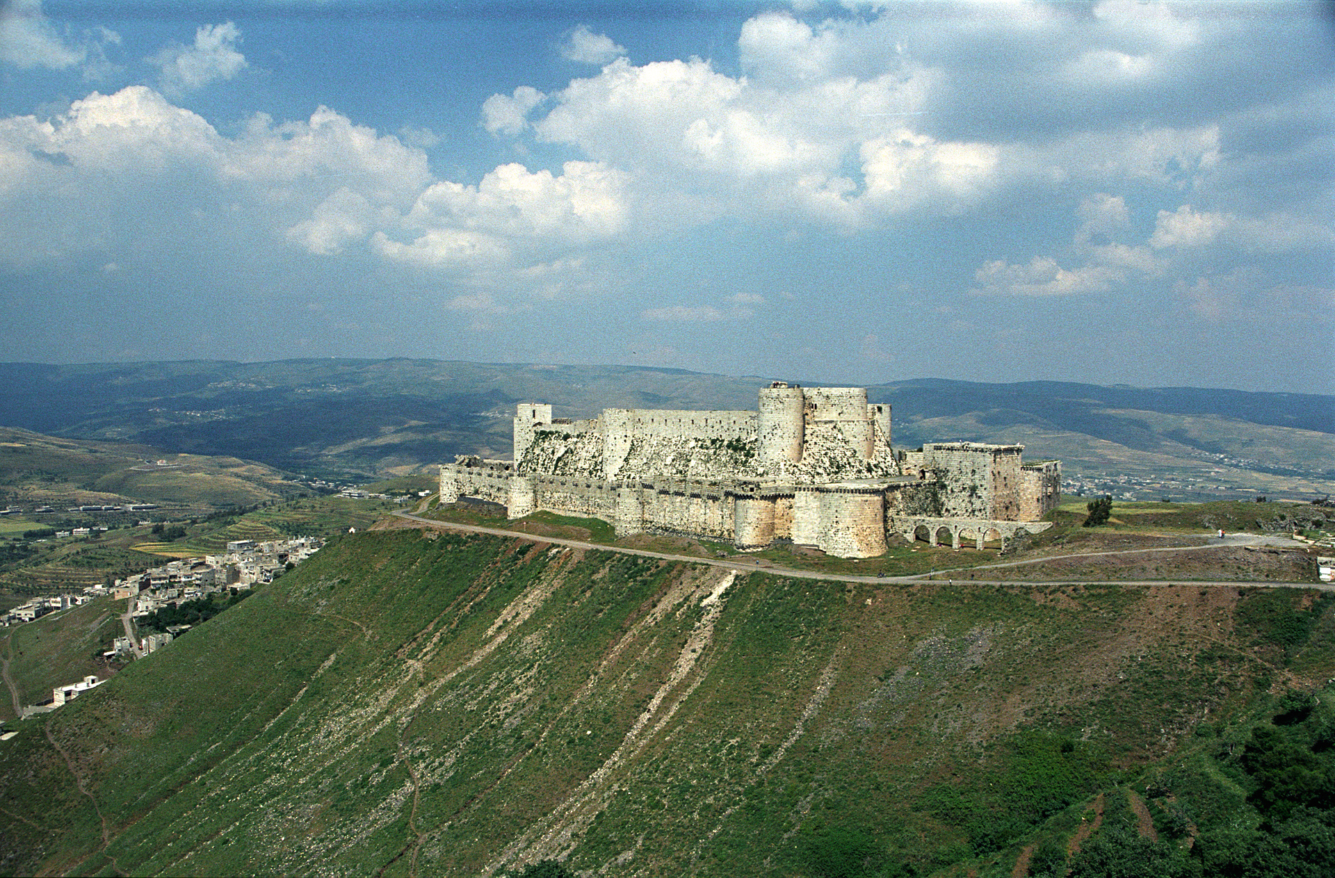 Krak des Chevaliers